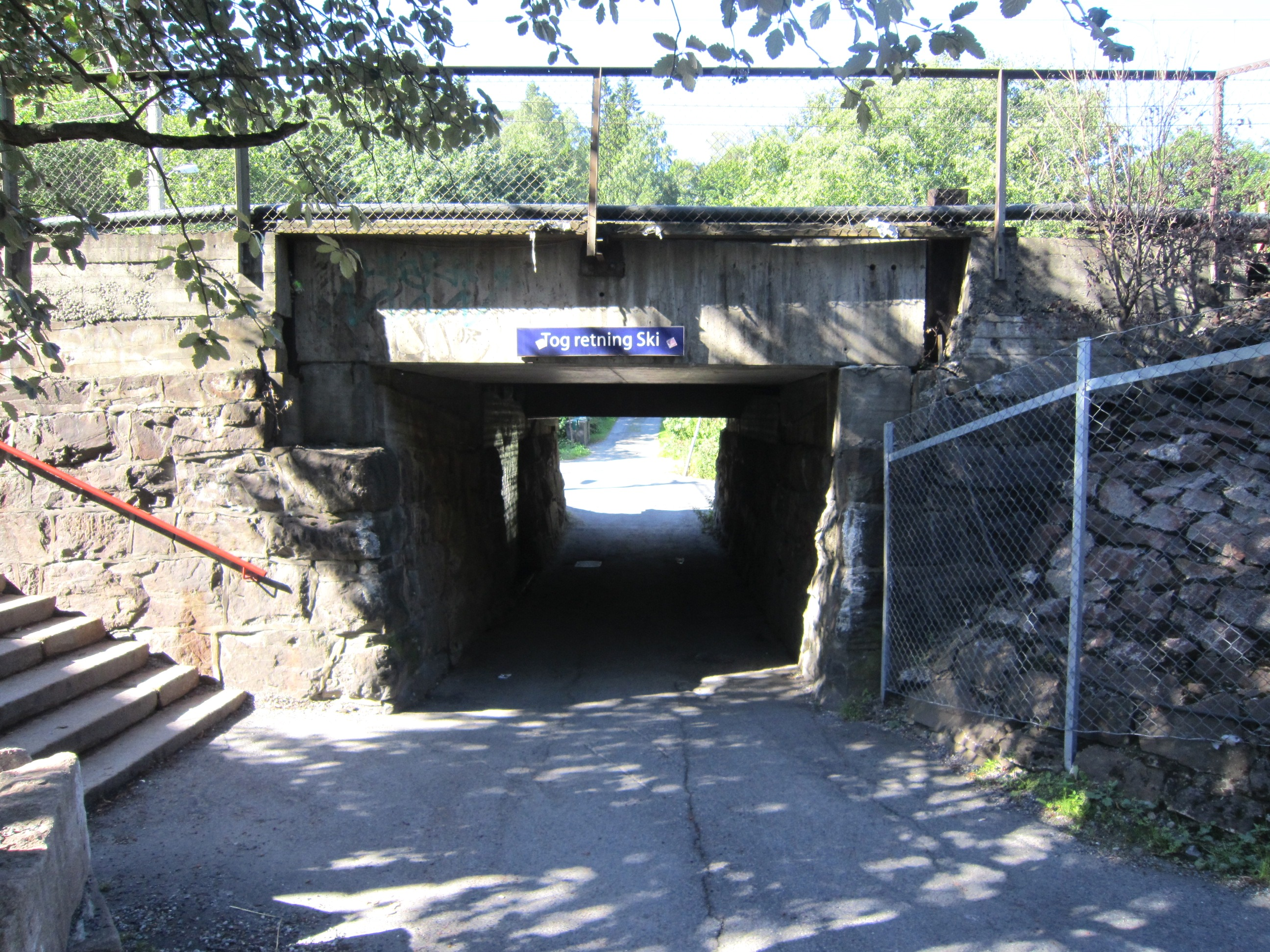 Kollstien starter ved Hauketo stasjon.